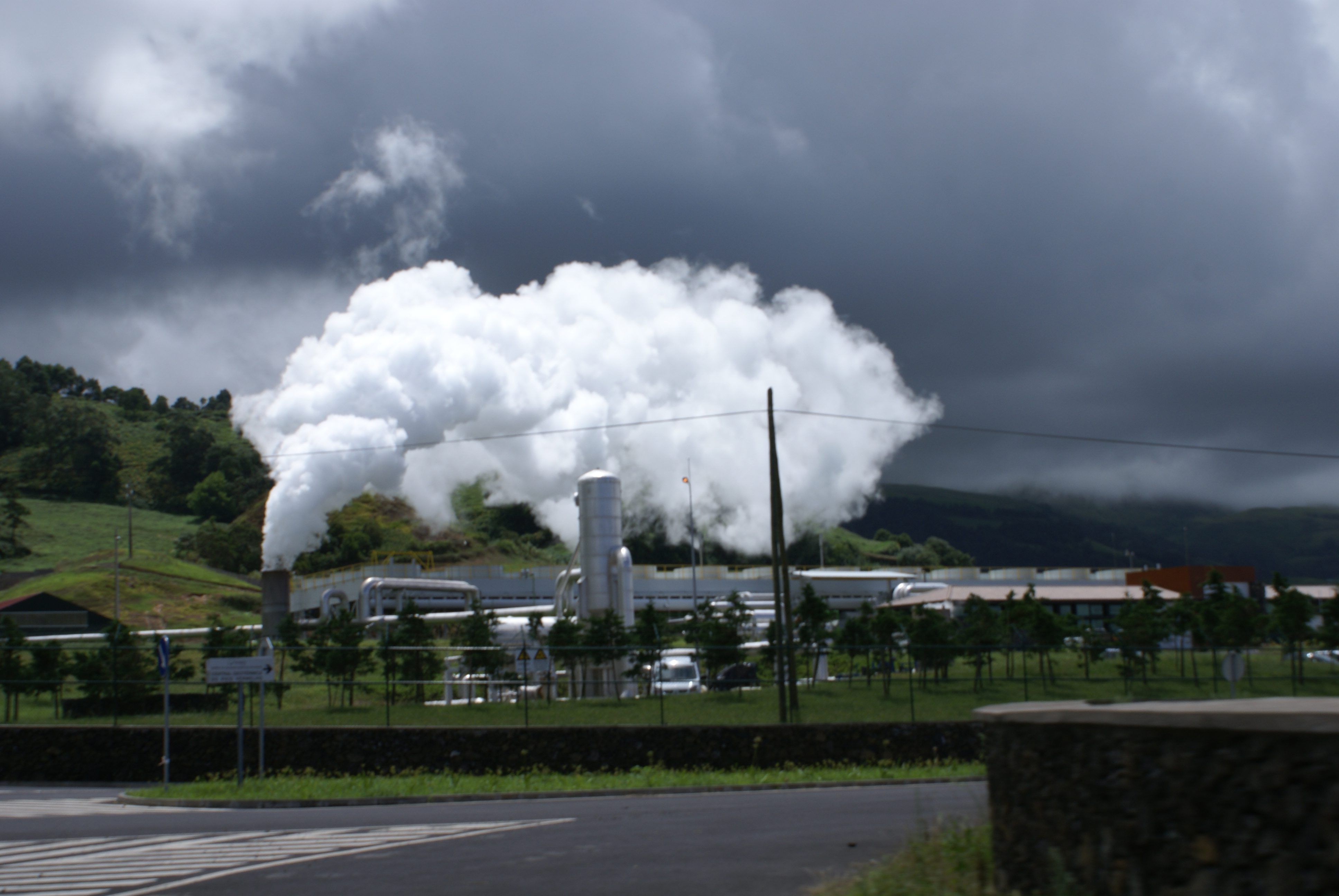 Central Geotermica do Pico Vermelho, maquinaria, Ribeira Grande, ilha de São Miguel